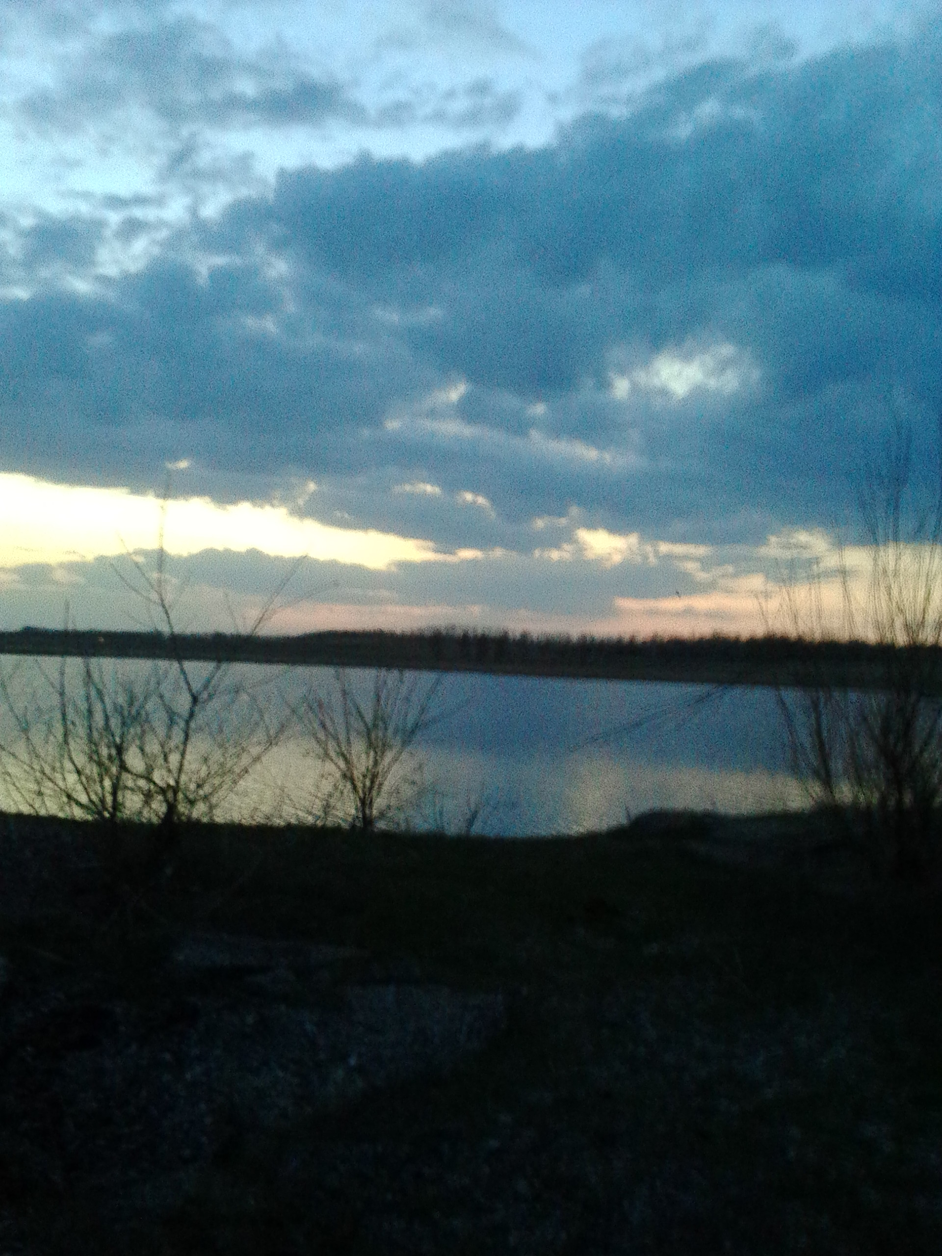 Кандры-Куль, Туймазинский район This image is related to the protected area of Russia number 0210213